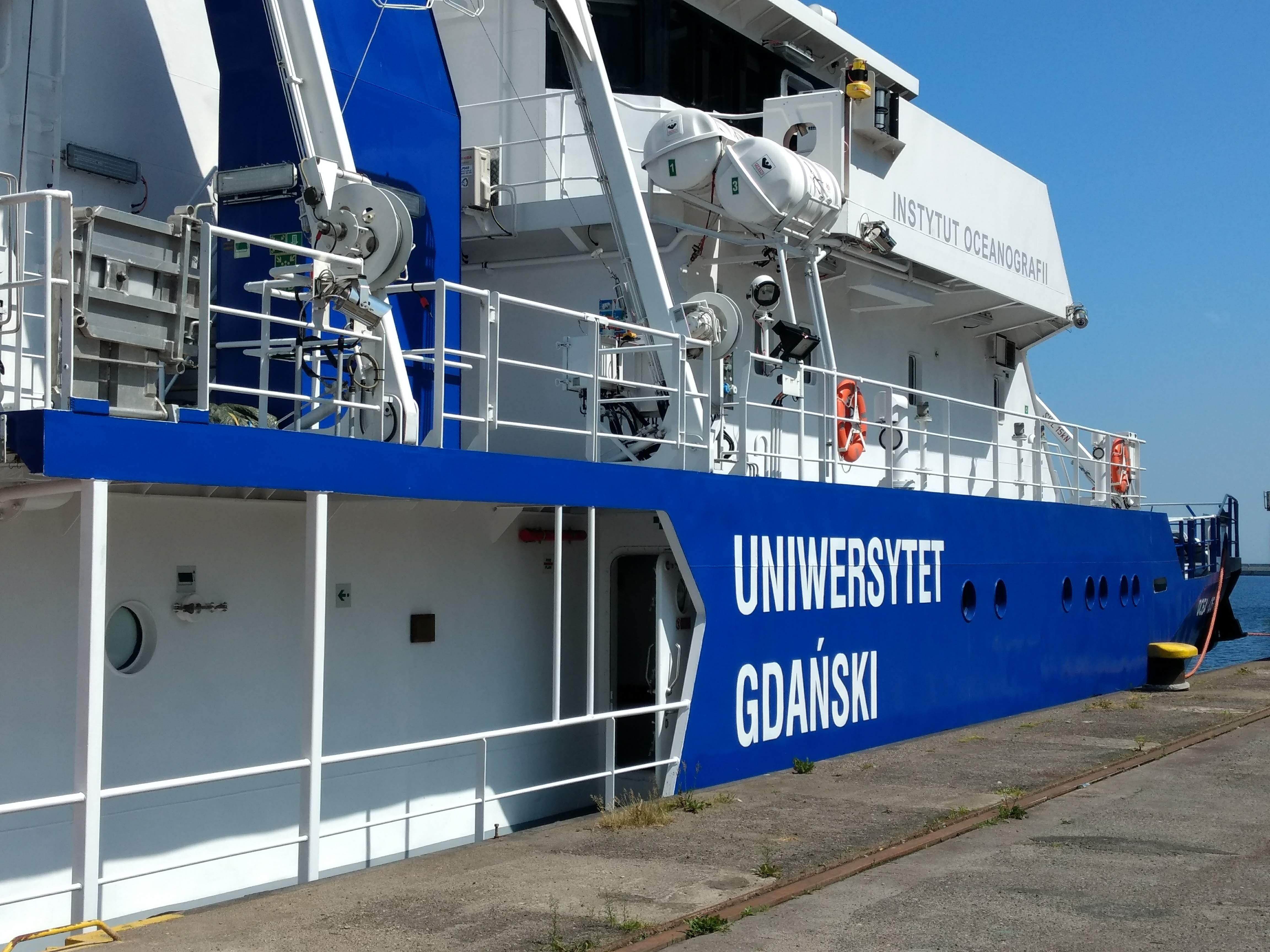 Oceanograf